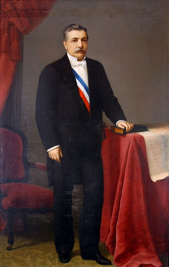 detail